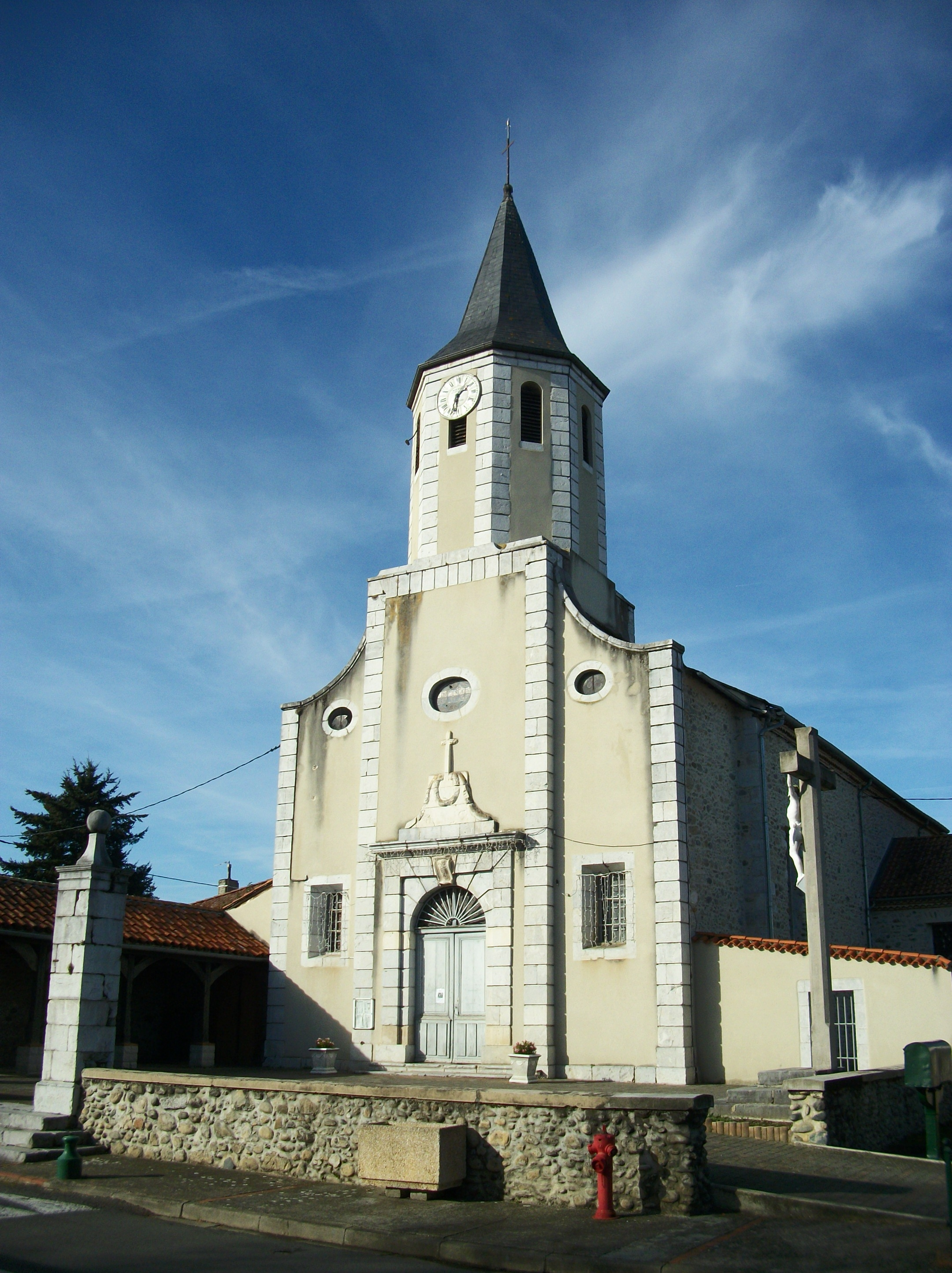 église